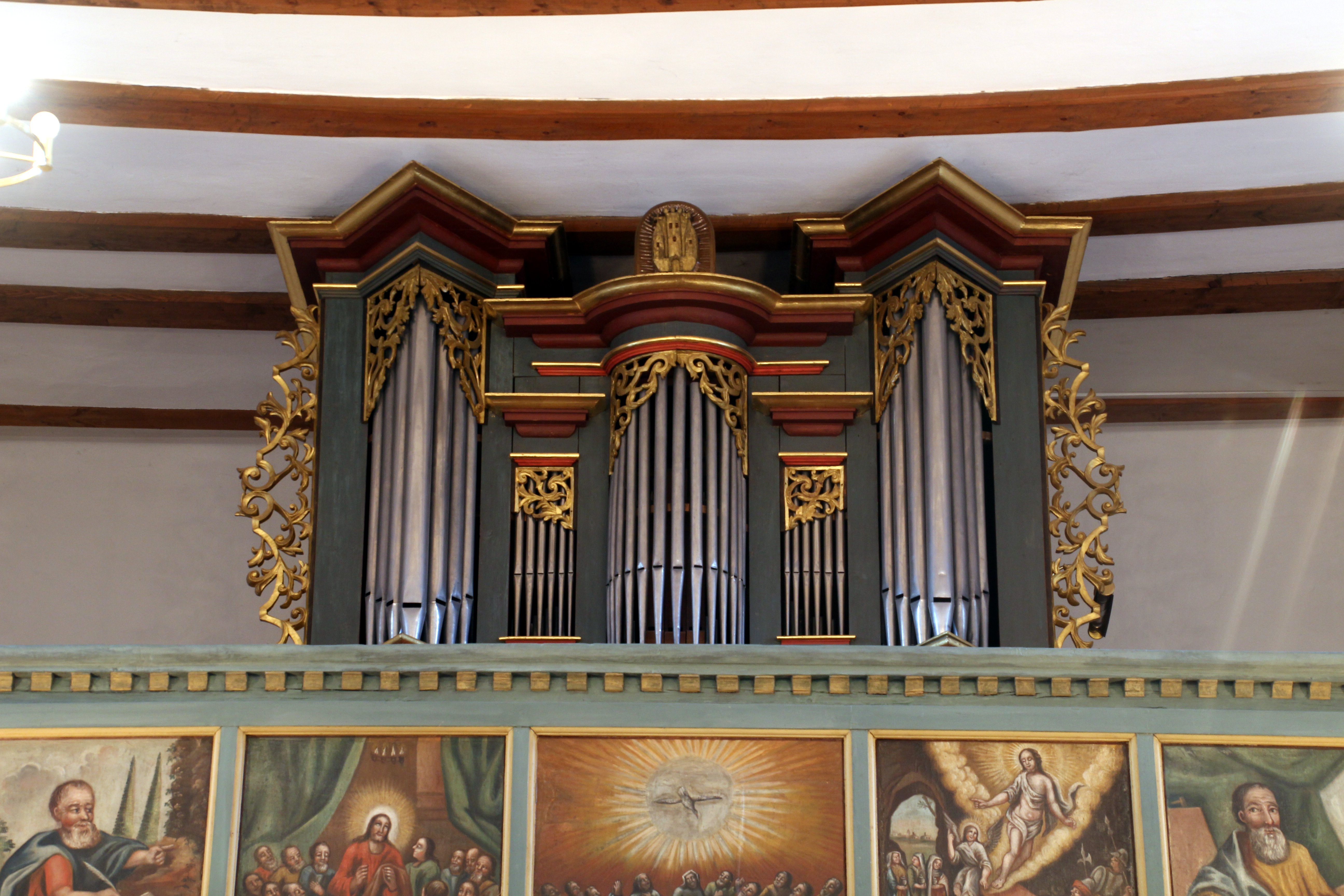 Evangelische Kirche Odenhausen (Lahn), Landkreis Gießen, Hessen, Deutschland